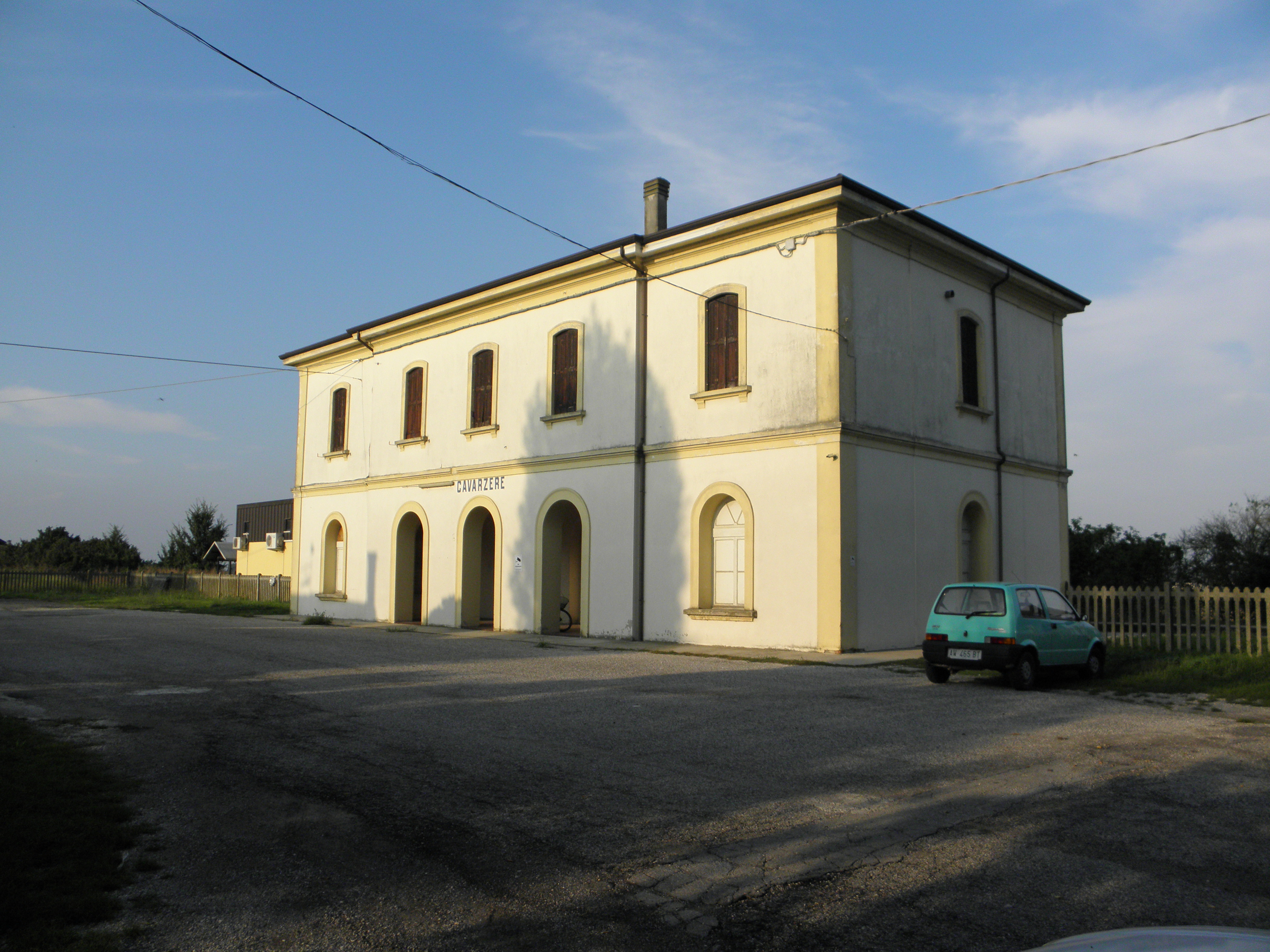 Cavarzere, la stazione ferroviaria.